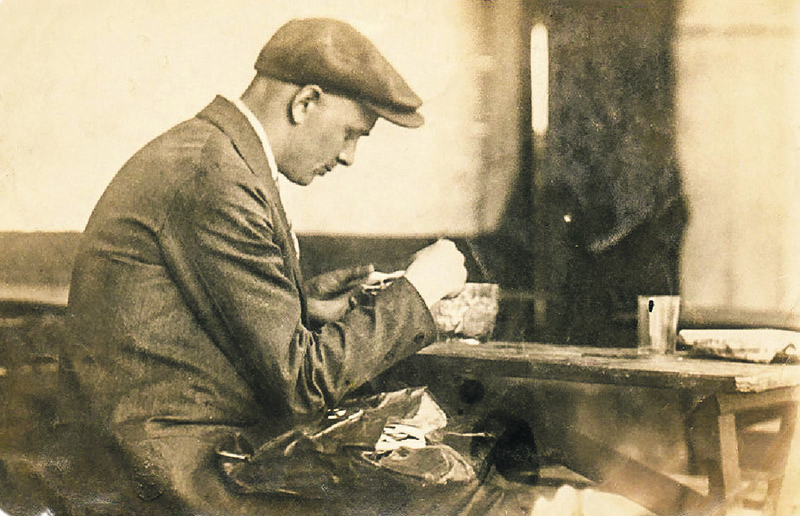 Беларускі паэт Валерый Маракоў (1909-1937)